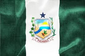 Bandeira do Município de Palhano, Ceará, Brasil.